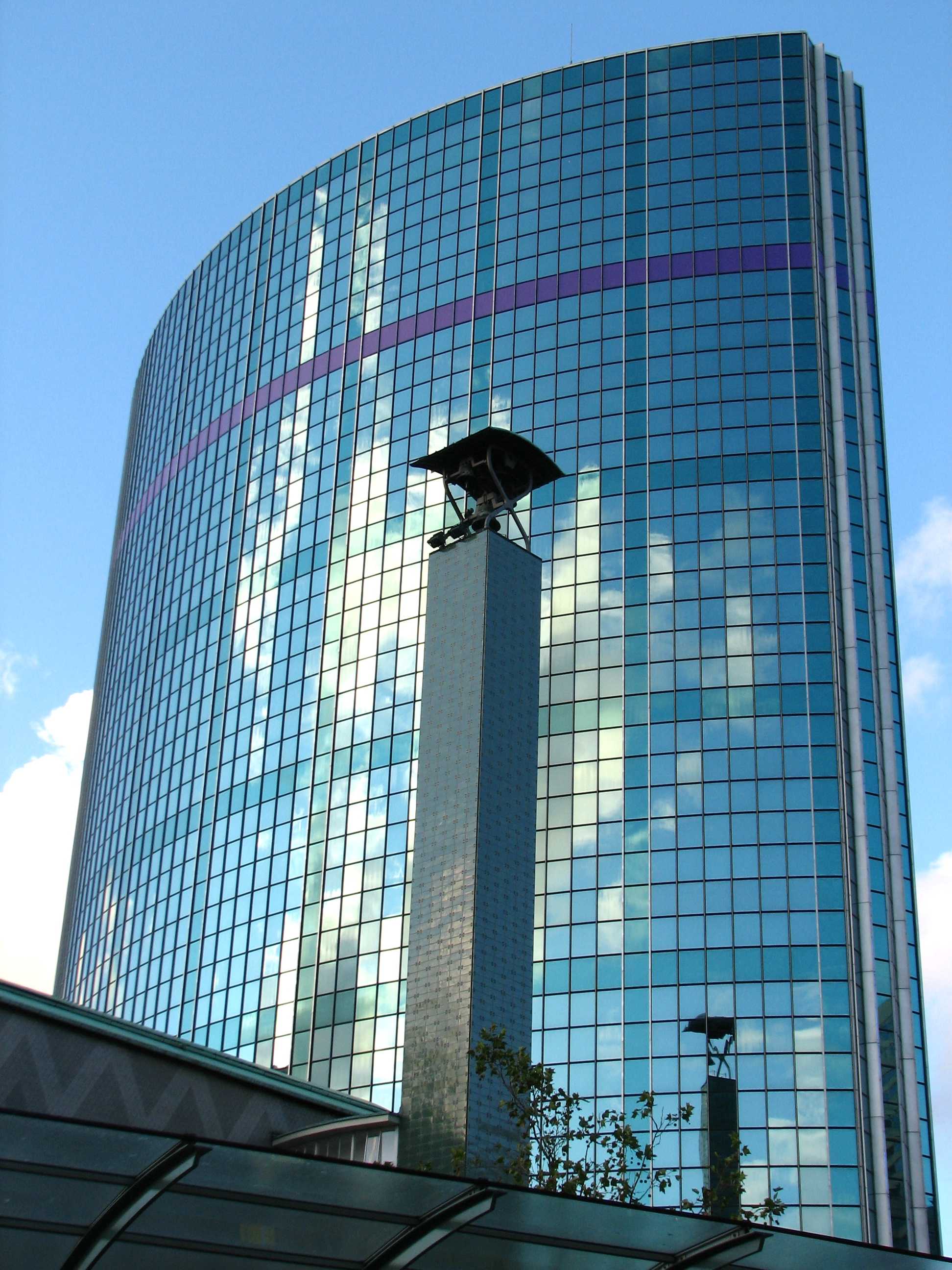 Beurs WTC, Coolsingel, Rotterdam